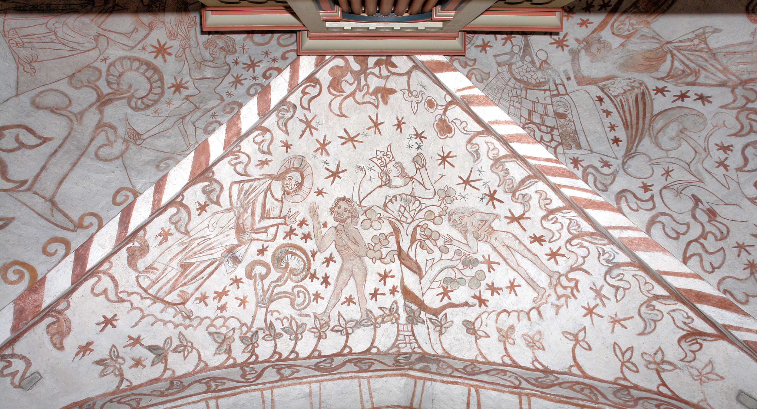 Kirche von Nødebo, Dänemark (Nord-Seeland). Fresken im spätromanischen Stil von 1425, ausgeführt von einem Künstler, der für die langen Nasen seiner Personen bekannt ist. Fresko Westseite des Schiffes: Sündenfall, Vertreibung aus dem Paradies, Verhöhnung Christi